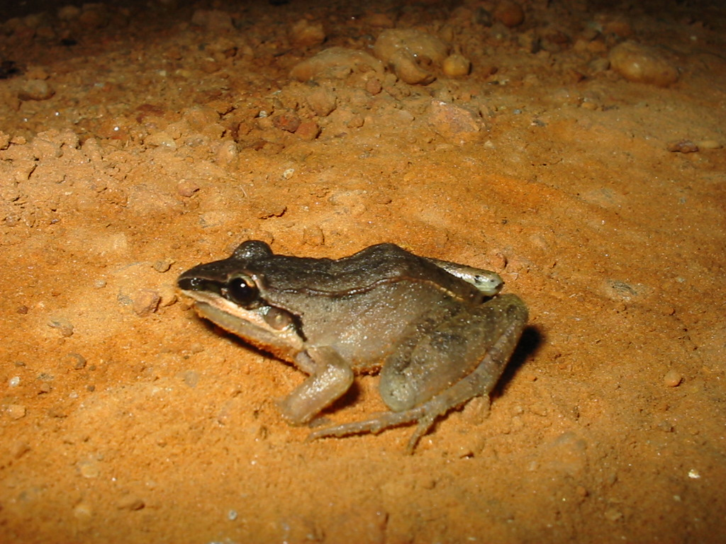 Leptodactylus spixi